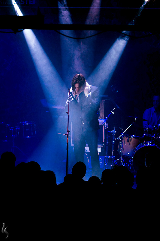 Boa @ Leipzig Concert